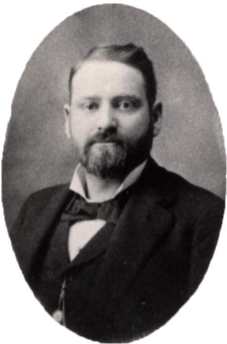 Sen T.B. Sumner